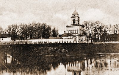 Тихвинский Введенский мон-рь. Фотография. Нач. XX в.